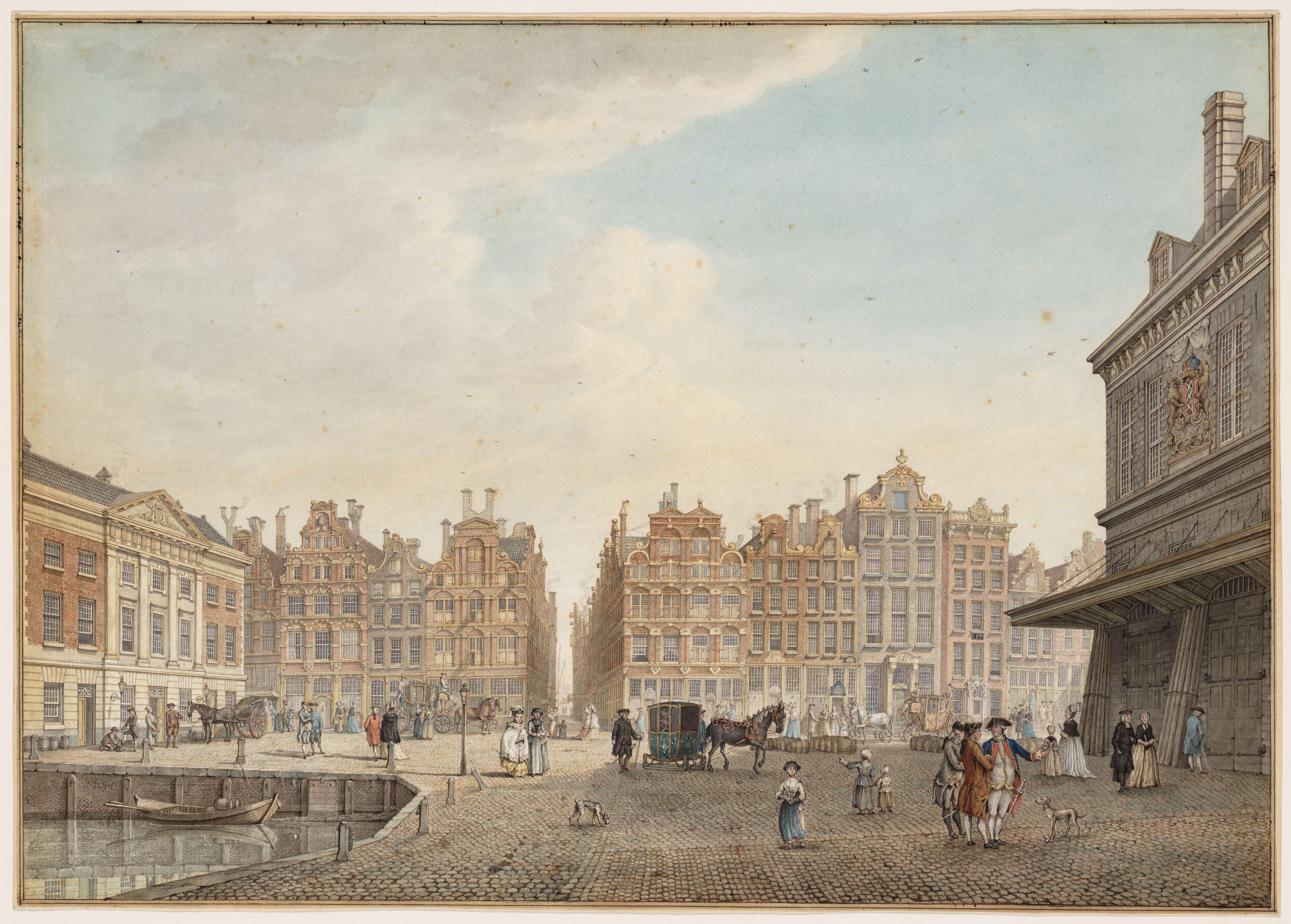 Gesigt van het water na de dam en beurssteeg te sien, na 't leven getekend